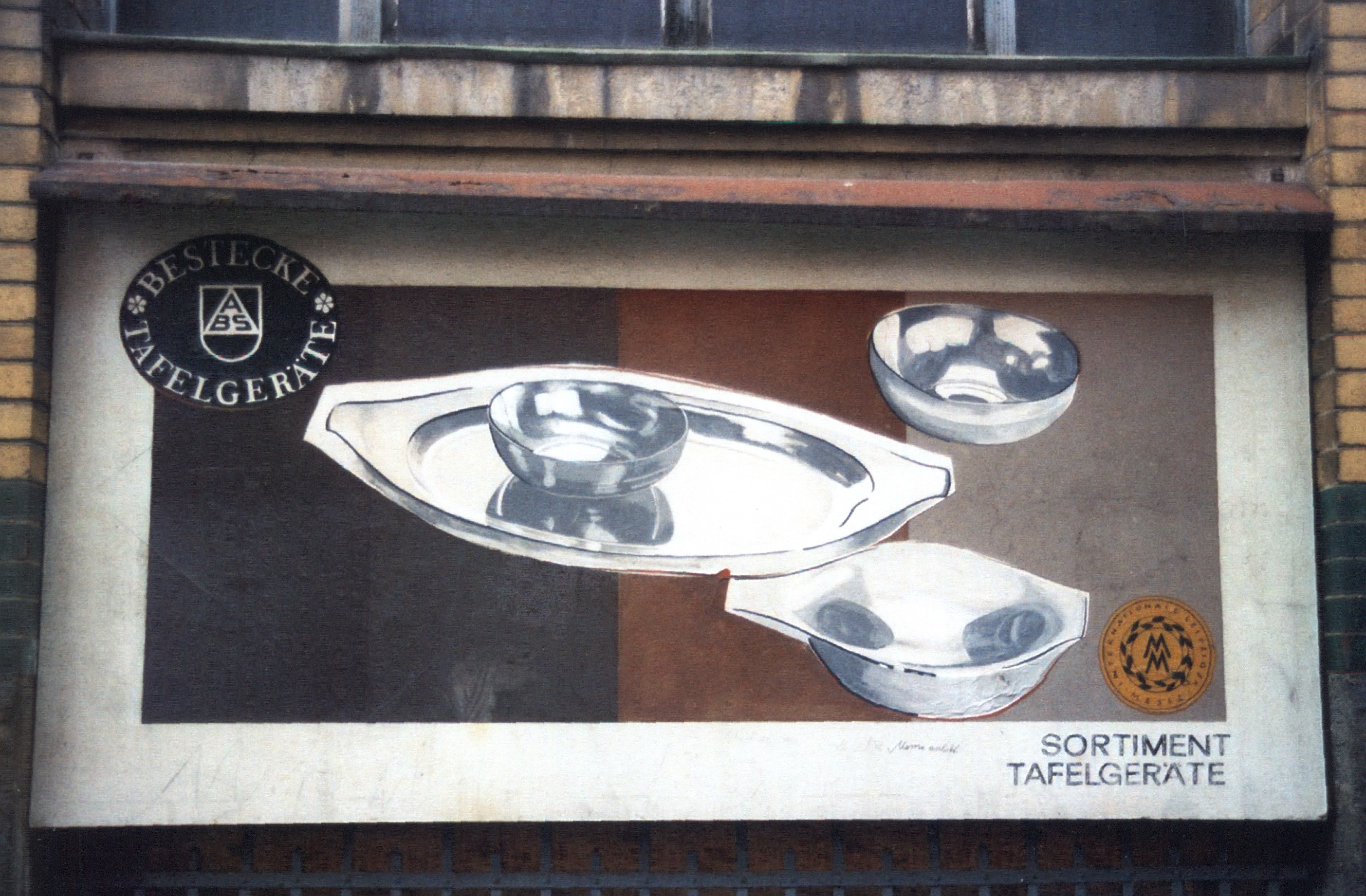 prämierte Tafelgeräte von Wellner/ABS um 1985, auf einer Werbetafel an der Marie-Müller-Straße 2004 gesehen